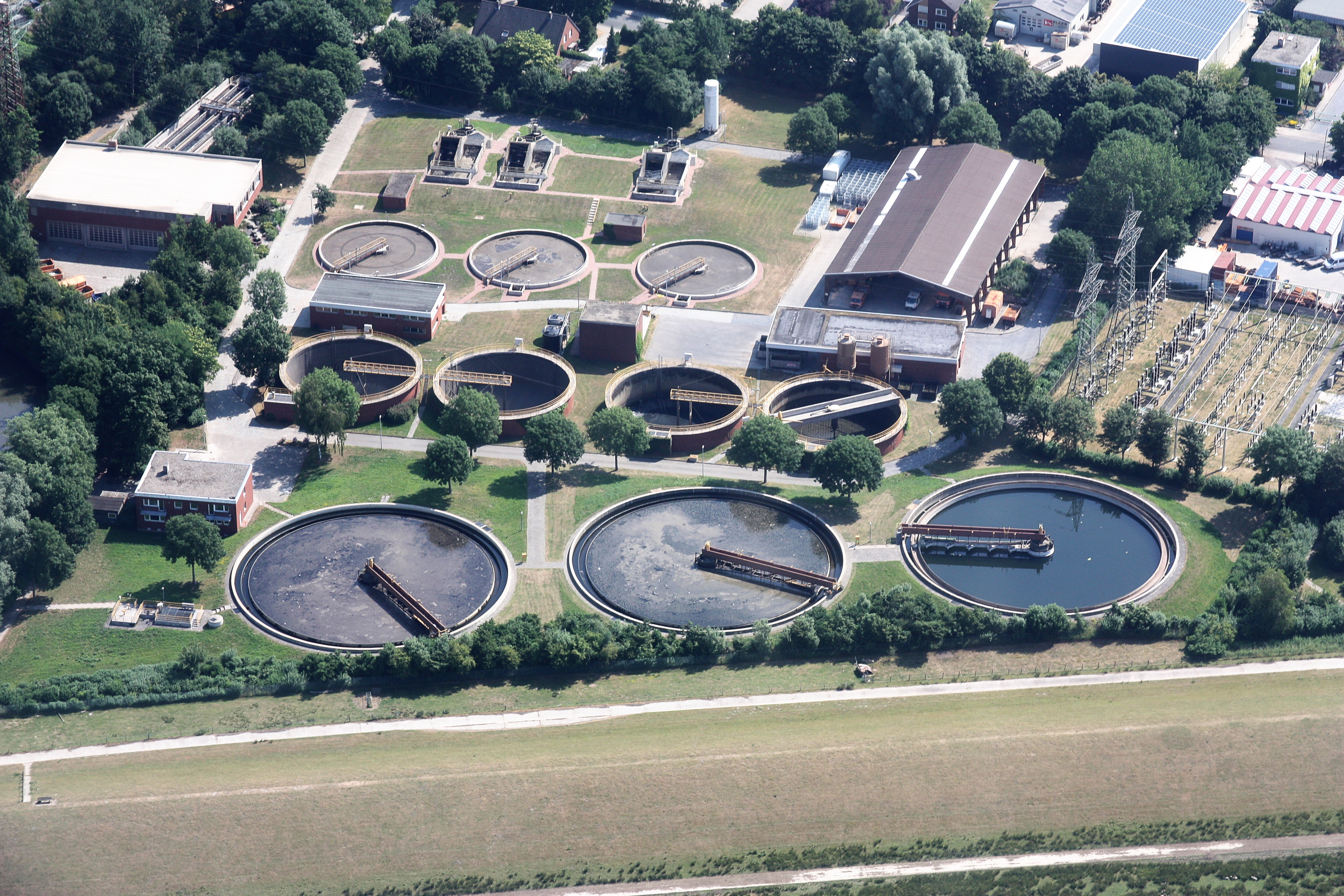 Luftaufnahme; Flug von Leer nach Emden; Flughöhe 1500 ft; Juli 2010; Originalfoto bearbeitet: Tonwertkorrektur und Bild geschärft mit Hochpassfilter